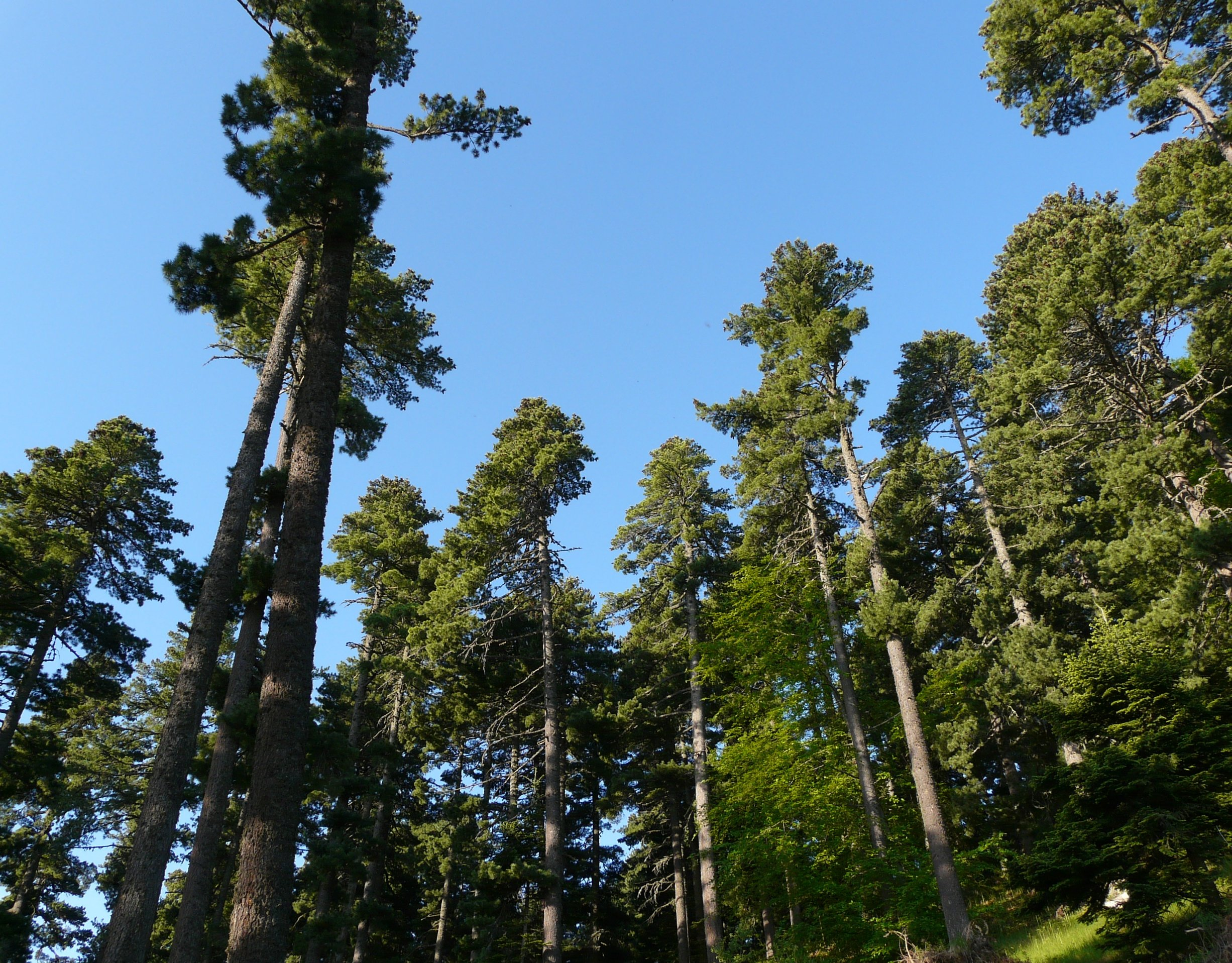 Pinus peuce forest, Pelister, Macedonia